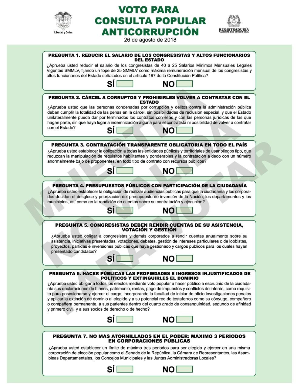 Bulletin de vote du référendum colombien de 2018